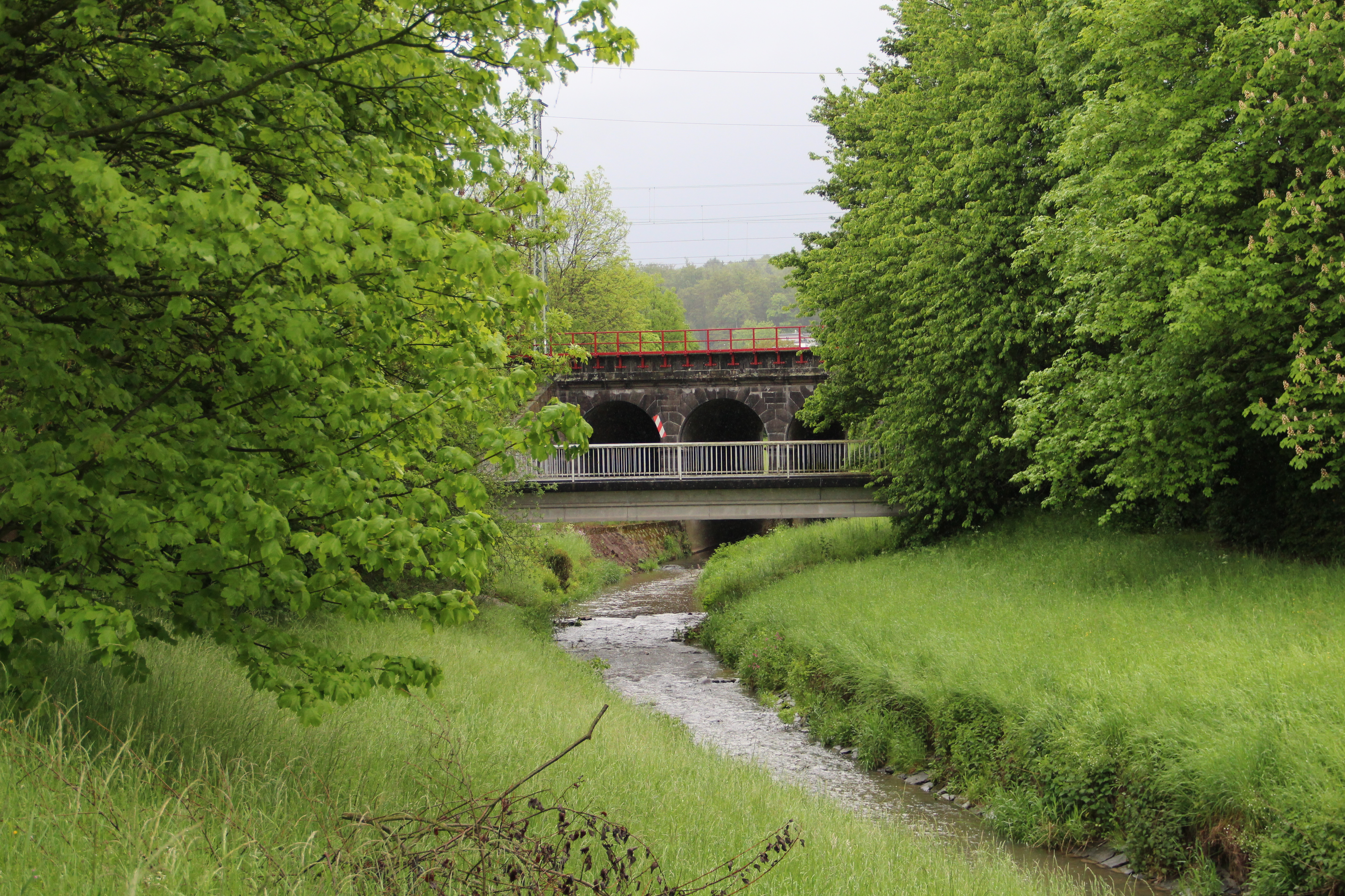 Lumda kurz vor der Mündung in die Lahn